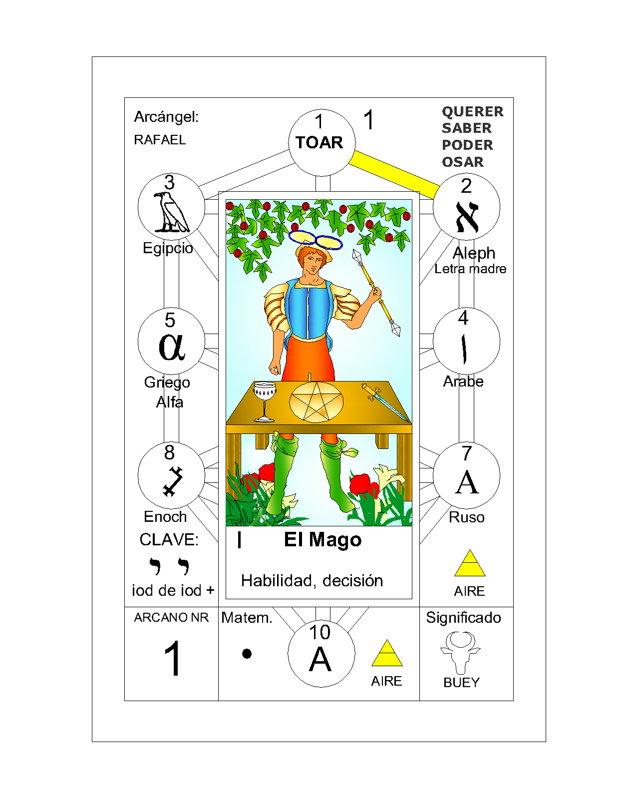 Arcano mayor: el mago